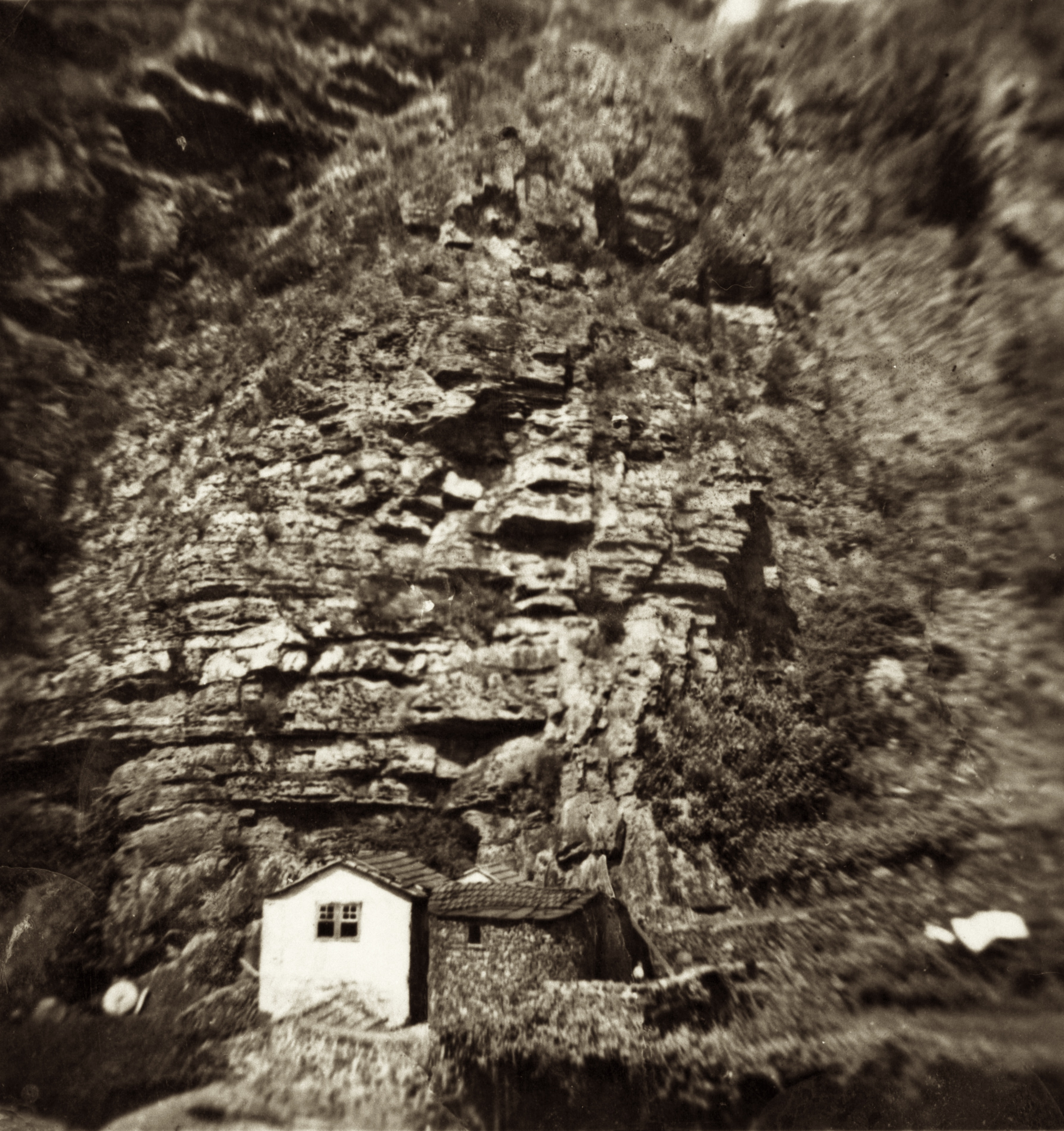 Vue de Nossa Senhora do Salto, "Notre Dame du Saut", Aguiar de Sousa, paredes, Portugal